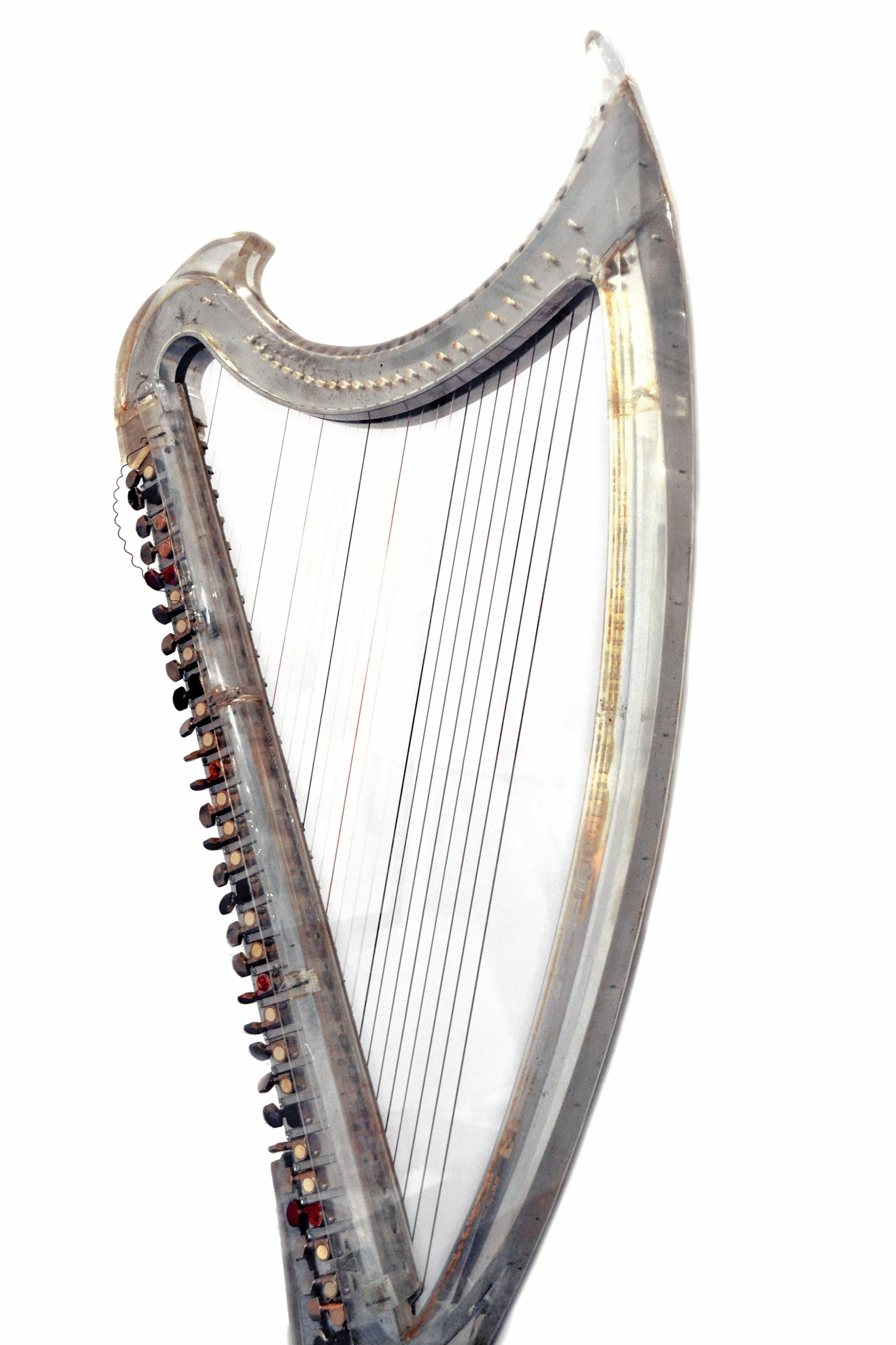 La Telenn Strink ("harpe de cristal" en plexiglas) conçue par Leo Goas-Straaijer entre 1986 et 1987 à partir d'un dessin d'Alan Stivell. Le harpiste l'utilise sur scène pendant une quinzaine d'années. Elle est exposée durant le mois de novembre 2015 à la médiathèque de Plérin-sur-mer (22) dans le cadre de l'exposition ROK par Frank Darcel (producteur de l'album Back to Breizh).